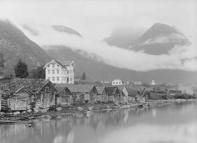 Hotel Alexandra i Loen (hotellet skifta namn frå Loen's Hotell til Hotel Alexandra i 1892)